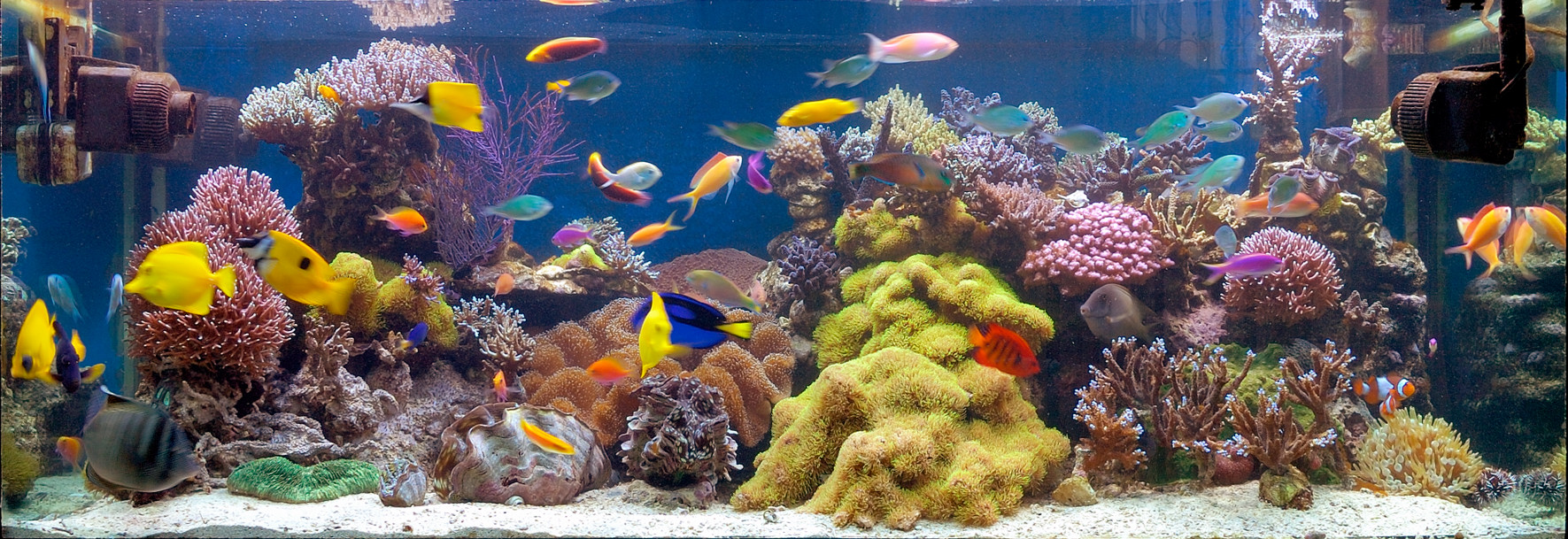 Reef Aquarium